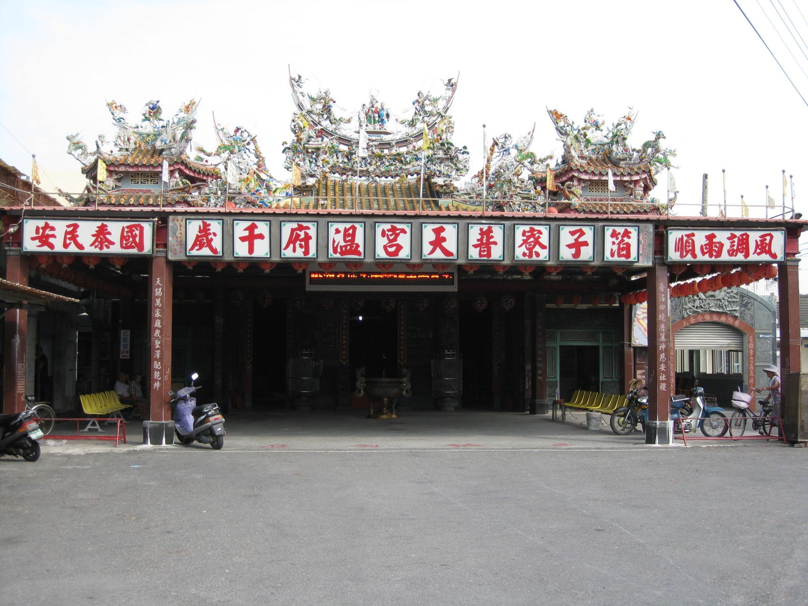 箔子寮普天宮位在箔子村，主祀溫府千歲，為當地信仰中心。